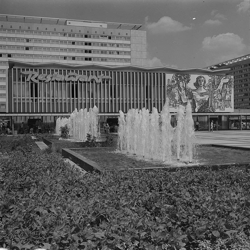 Original image description from the Deutsche FotothekDresden. Restaurant Bastei auf der Prager Straße